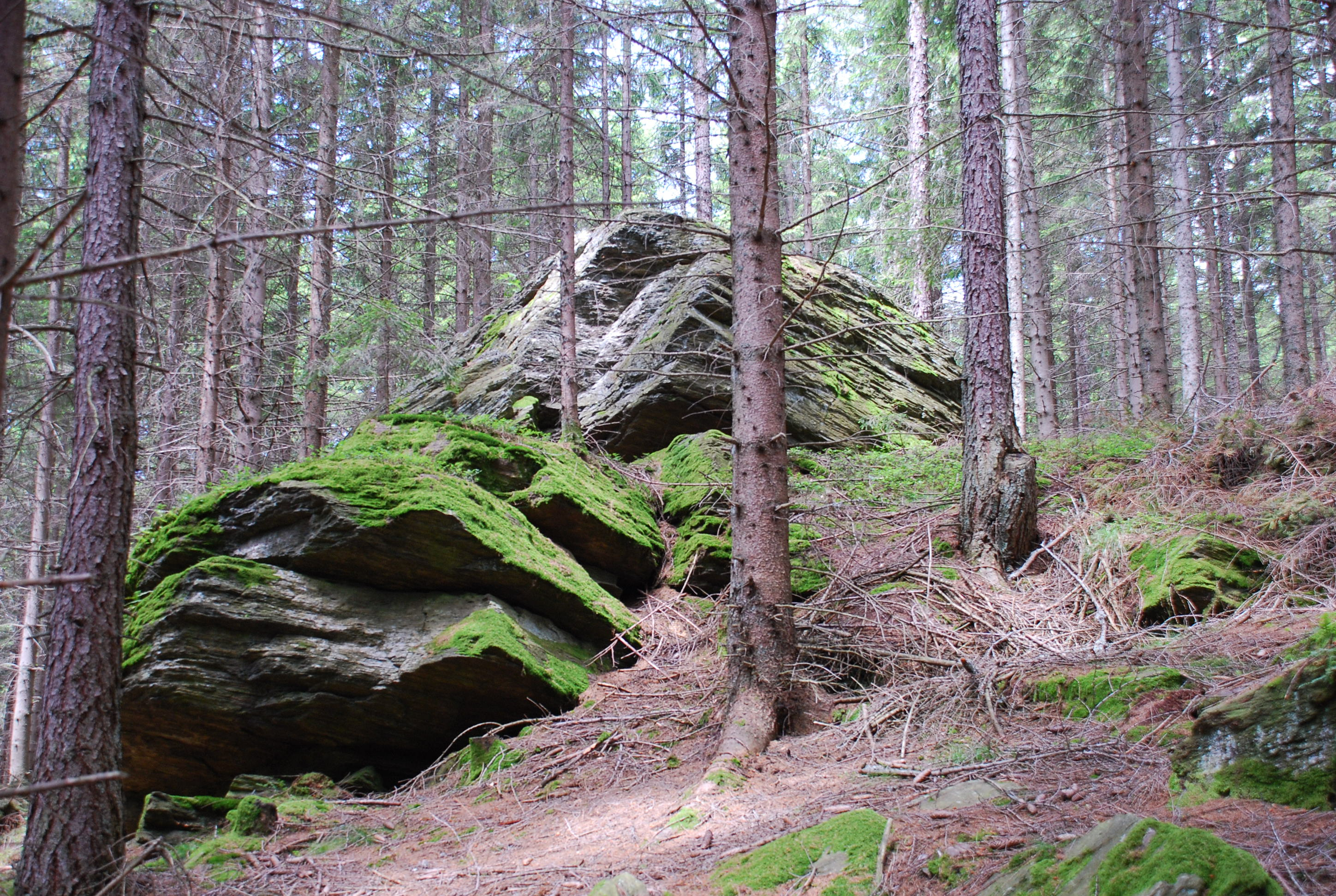 Ofen (Gesteinsformation aus Plattengneis) in Rettenbach, Gemeinde Kloster